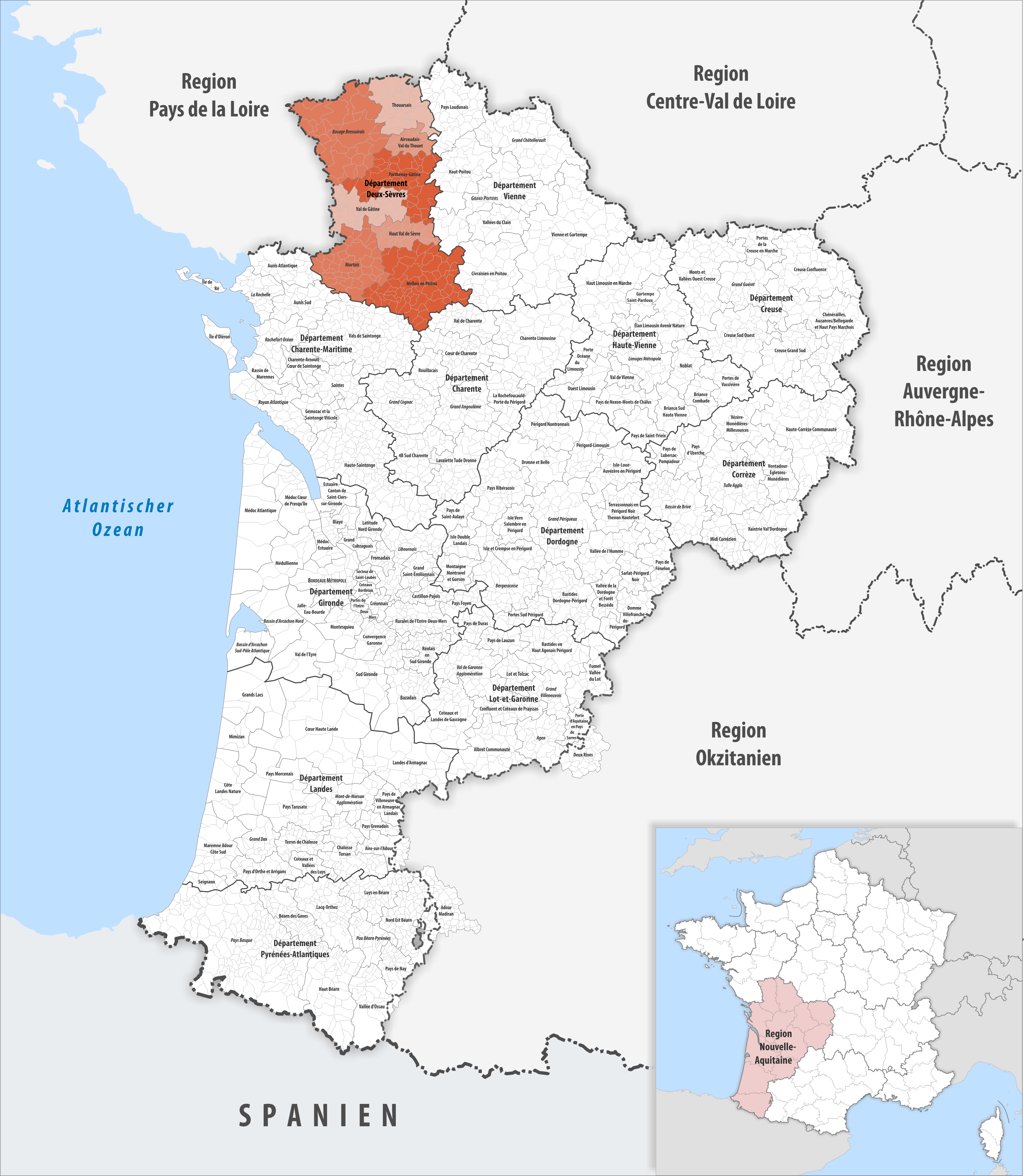 Gemeindeverbände im Département Deux-Sèvres